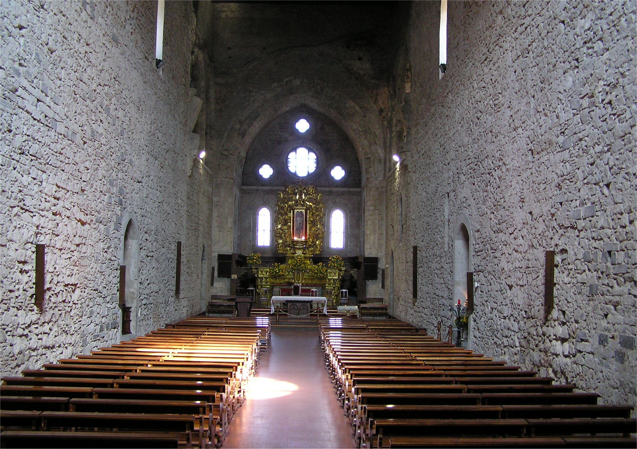 Interno Abbazia Florense (Foto di Luigino C.)